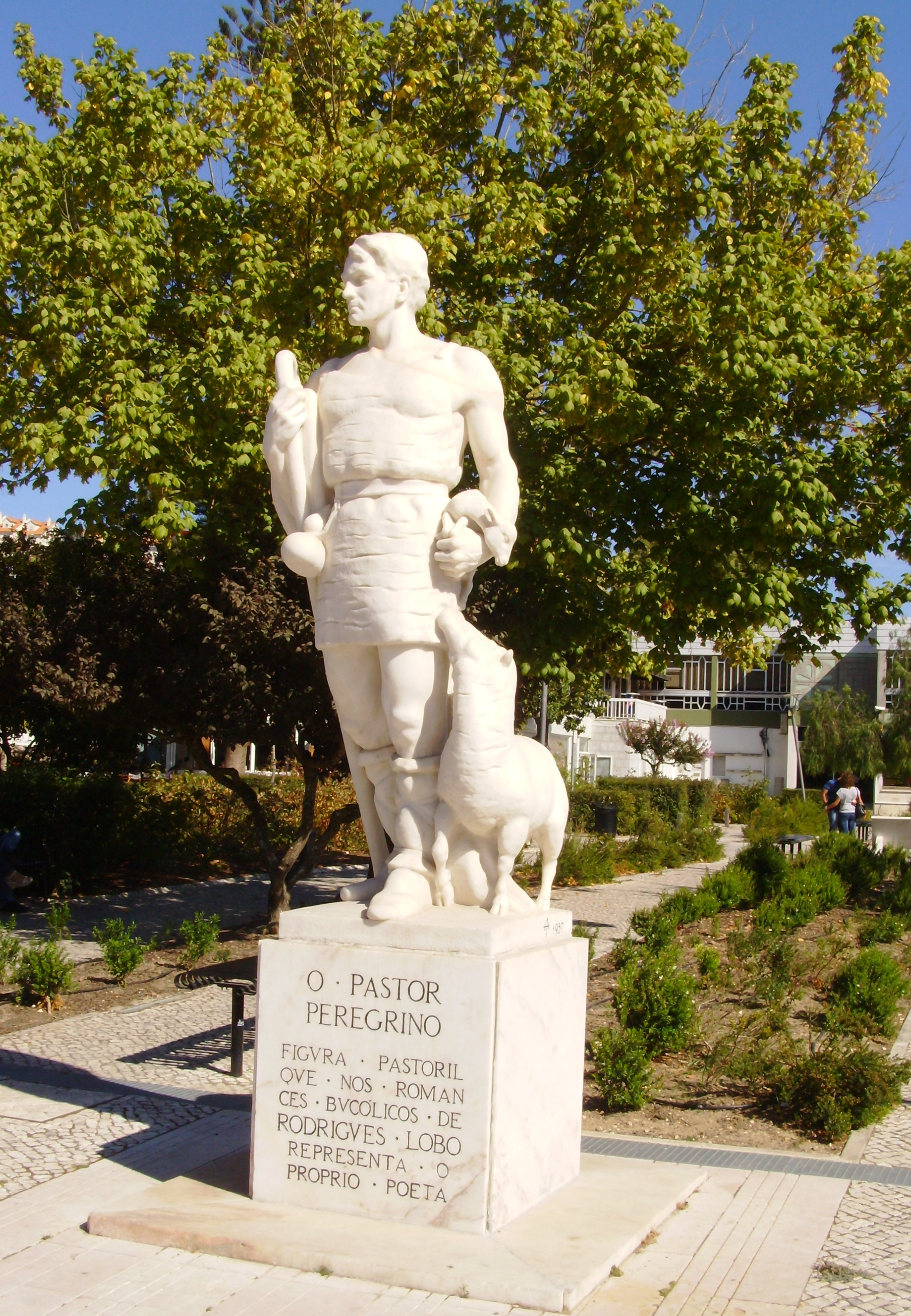 "O Pastor Peregrino" (Pedro Anjos Teixeira, 1957). Materiais: calcário (escultura) e betão (pedestal). A escultura, instalada no Jardim Luís de Camões em Leiria em 1959, foi uma oferta do então Ministro das Obras Públicas, Eng. Arantes e Oliveira à Câmara Municipal de Leiria.